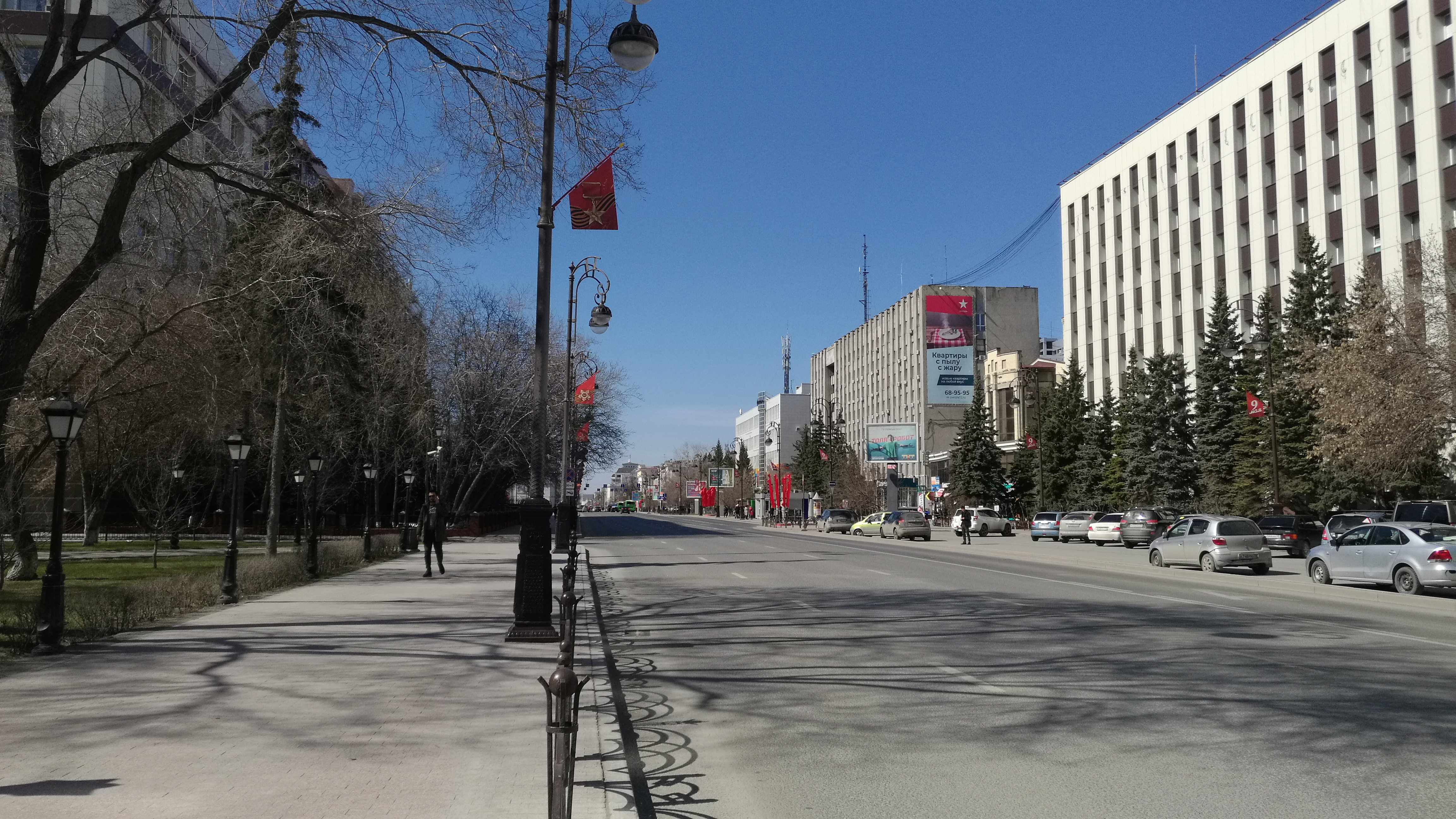 Strato Respubliko. Tjumeno, Rusio.